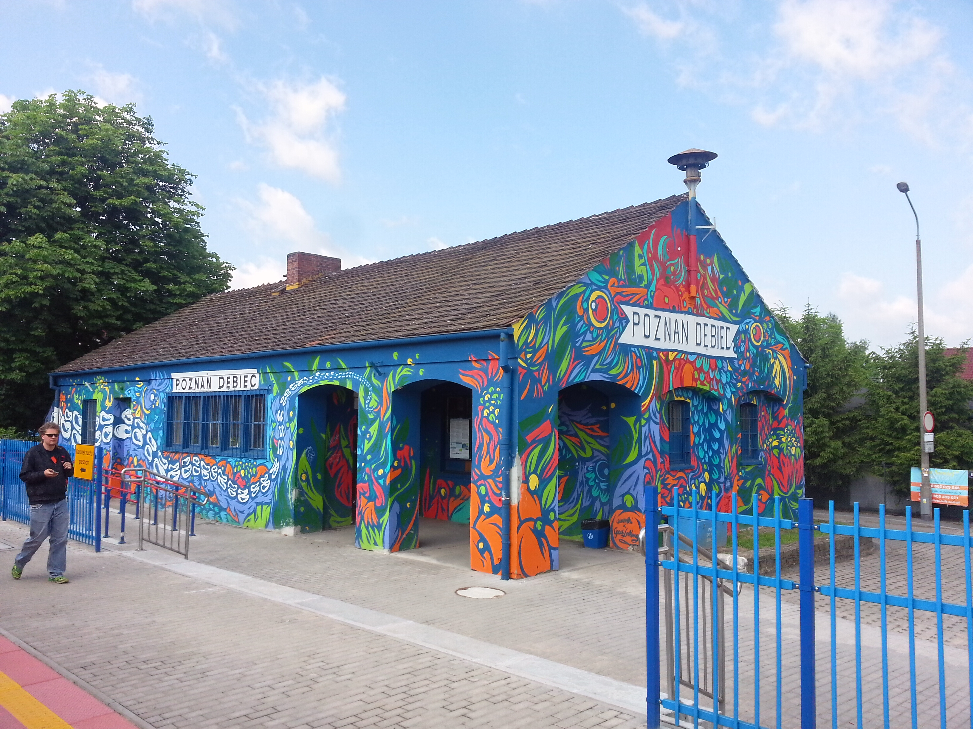 Przystanek osobowy przy LK 271